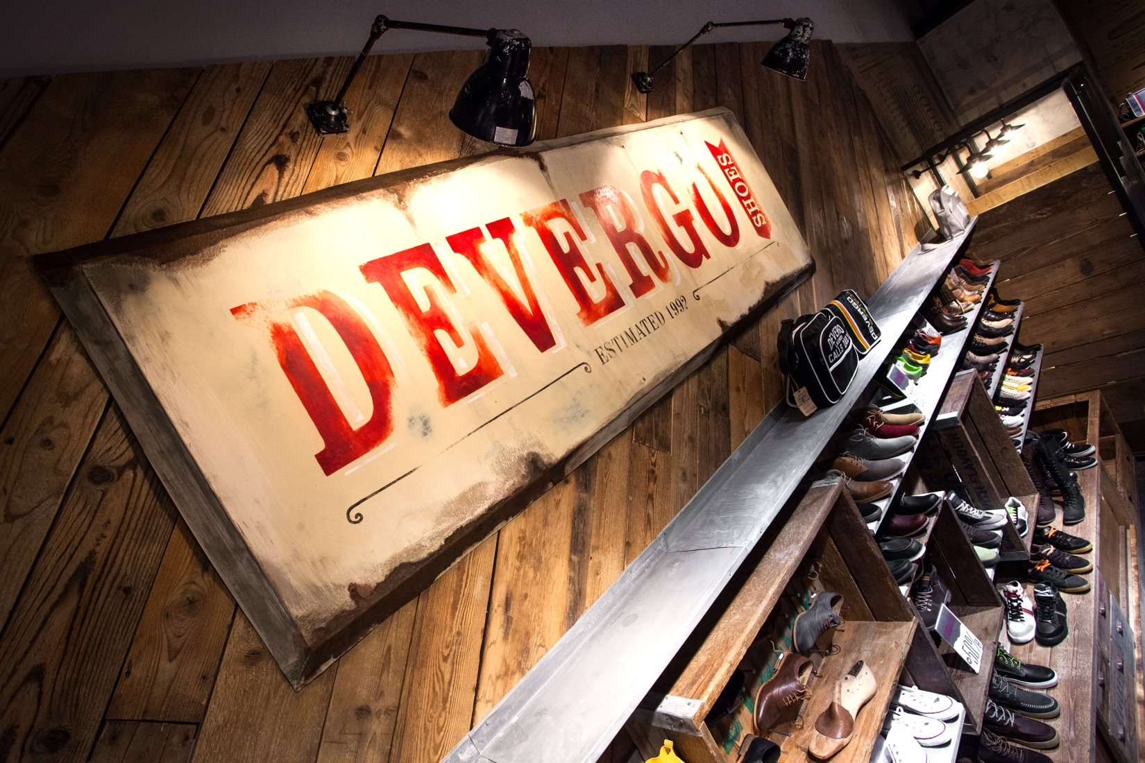 "Hand-made" logo.